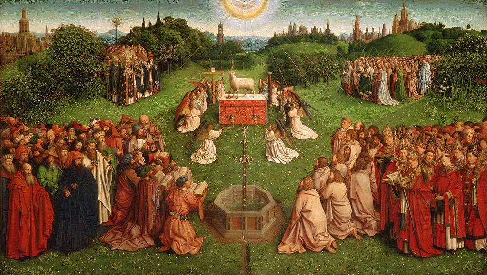 retable de l'Agneau mystique